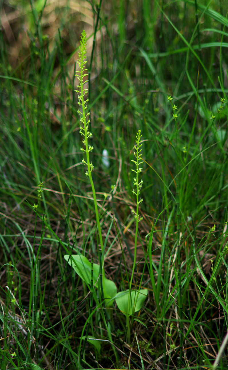 Wyblin jednolistny (Malaxis monophyllos) - Młaki nad Pogorią I w Dąbrowie Górniczej.